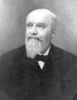 Clinton Bowen Fisk (1828–1890)